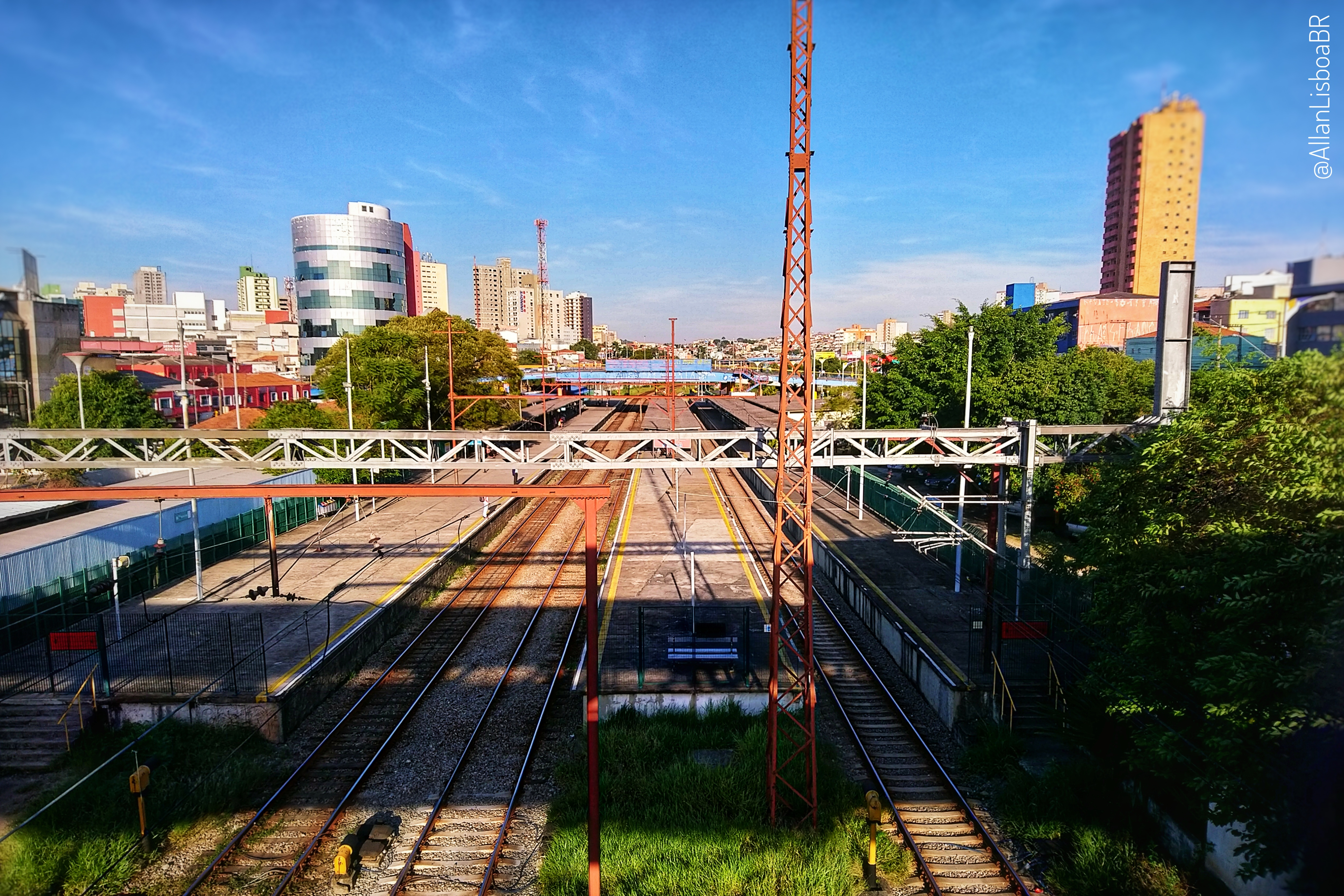 Visão das plataformas da estação Mauá